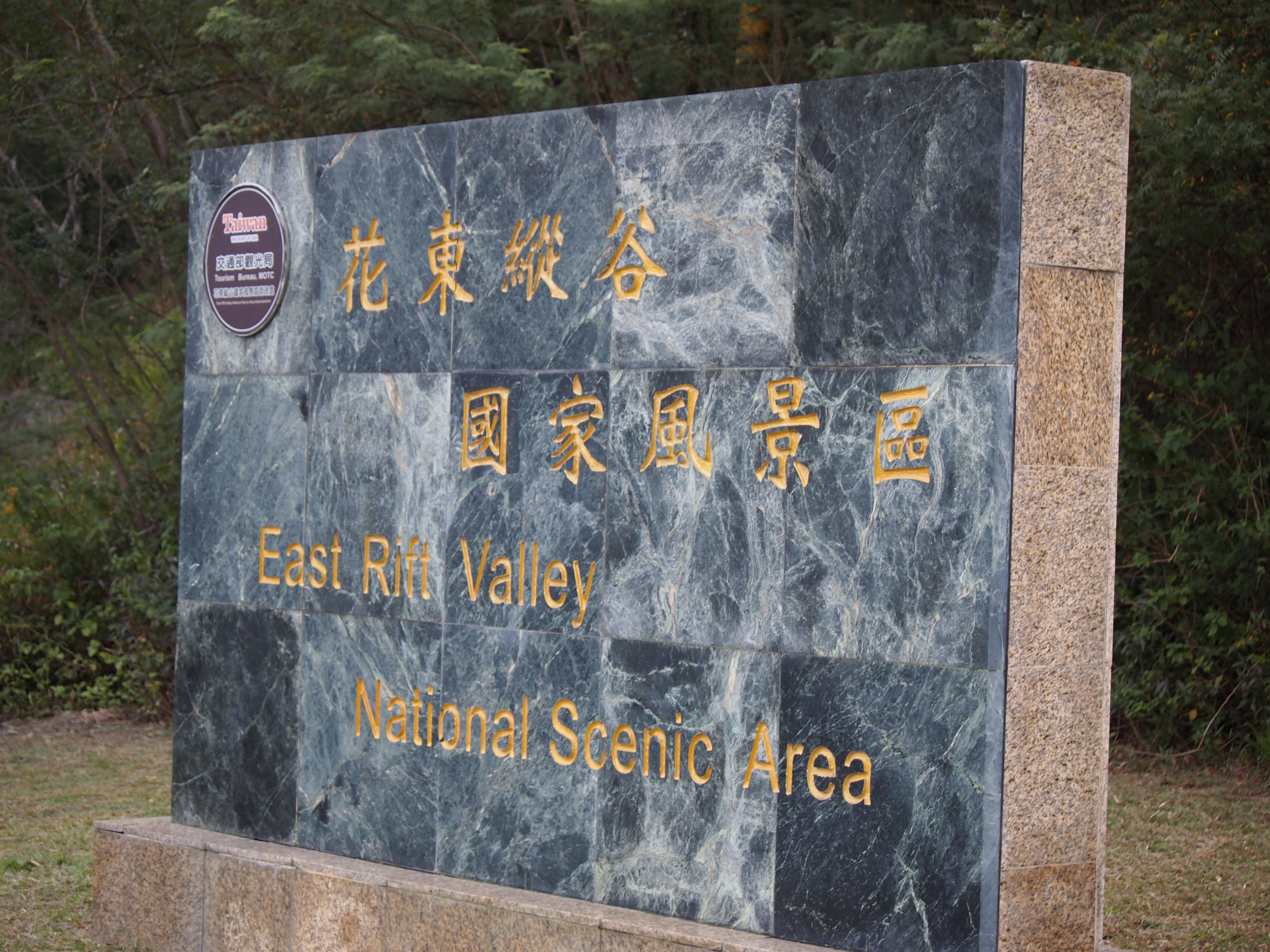 花東縱谷國家風景區石碑，交通部觀光局花東縱谷國家風景區管理處設置。